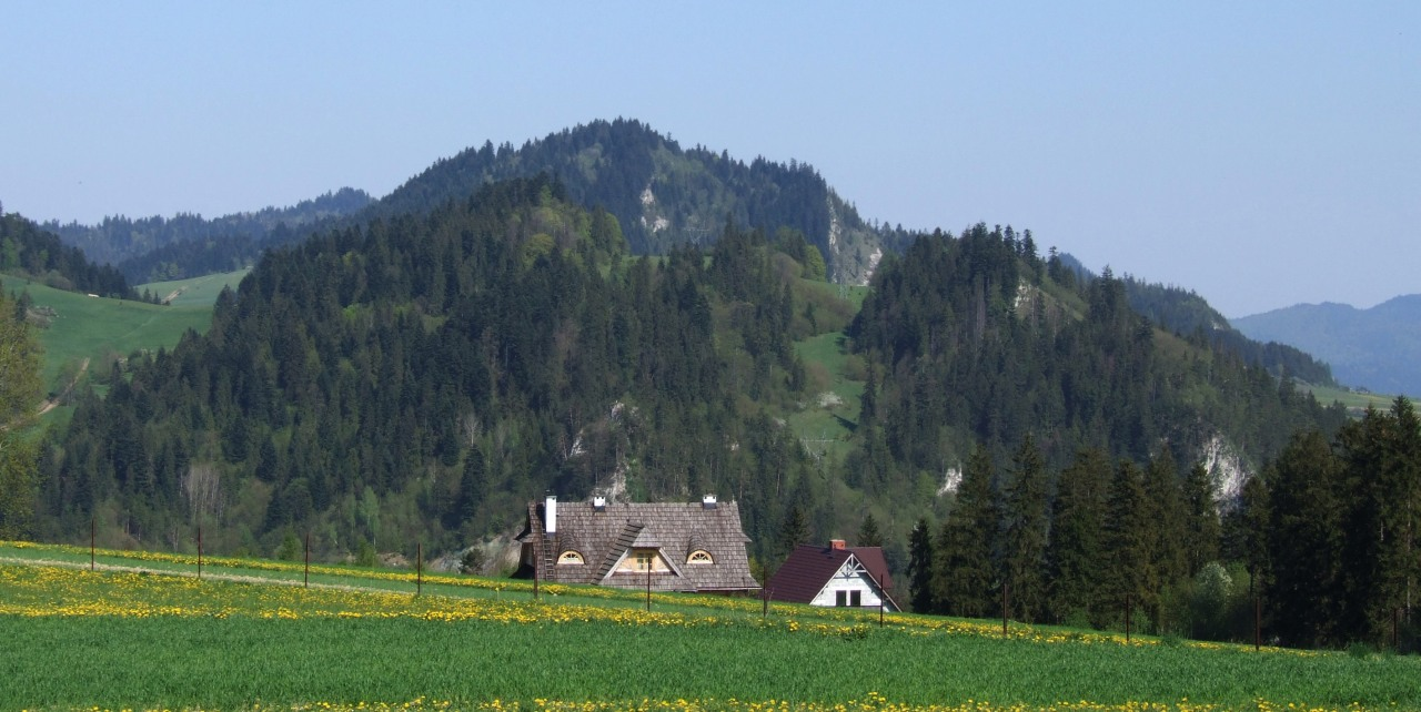 Upszar, nad nim Flaki, widok z Pienin Spiskich.